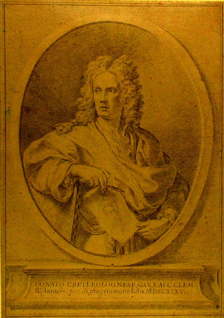 Self-portrait